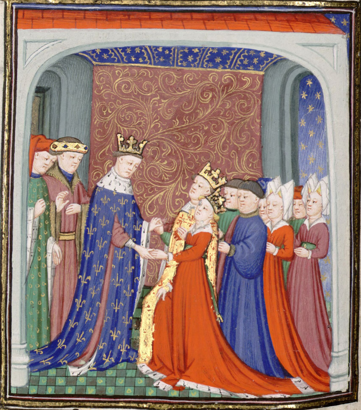 Filip VI. přijímá Davida II. Skotského s manželkou Janou